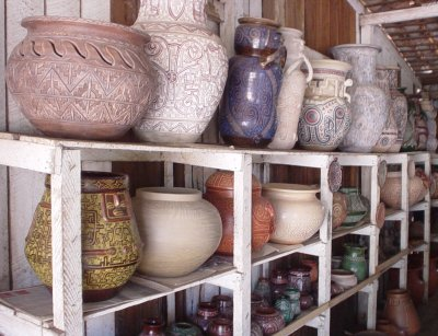 Keramikmanufaktur in Icoarací / Belém / Pará